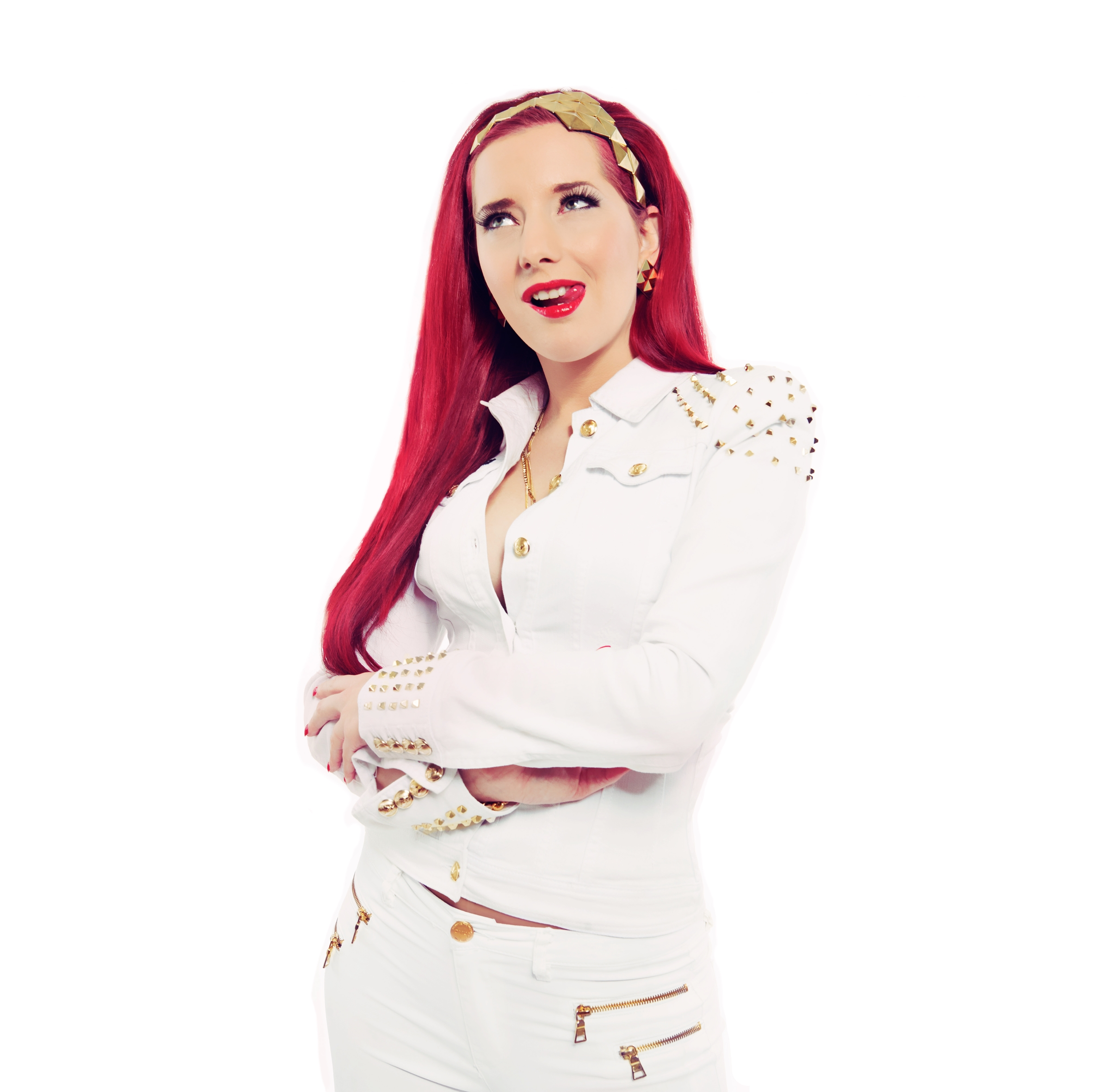 Cora Lee offizielles Pressefoto